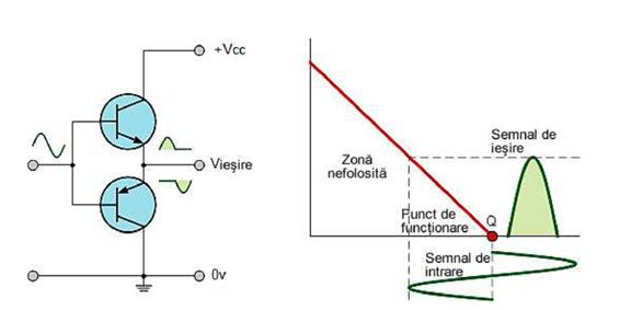 schema electrica si reprezentare grafica a unui amplificator in clasa B